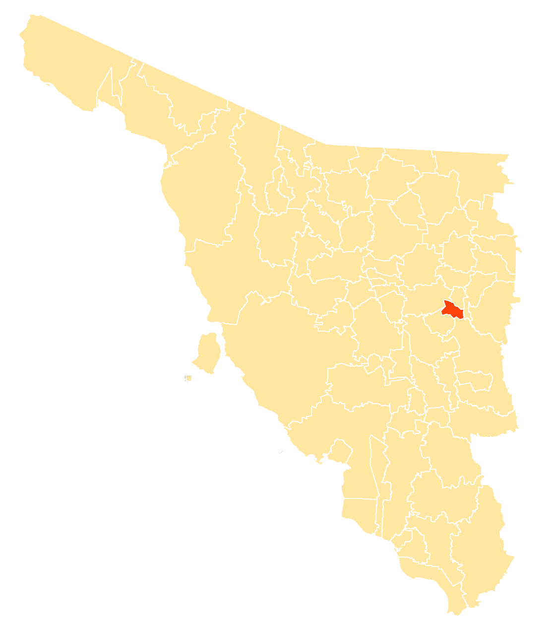 Municipio dentro de Sonora, México.